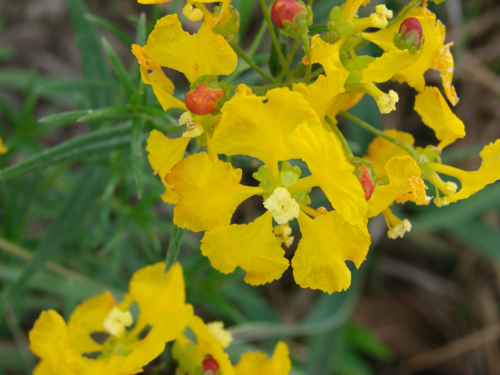 Camarea ericoides - MALPIGHIACEAE Parque Estadual da Serra dos Pirineus - Pirenópolis - Goiás - Brasil